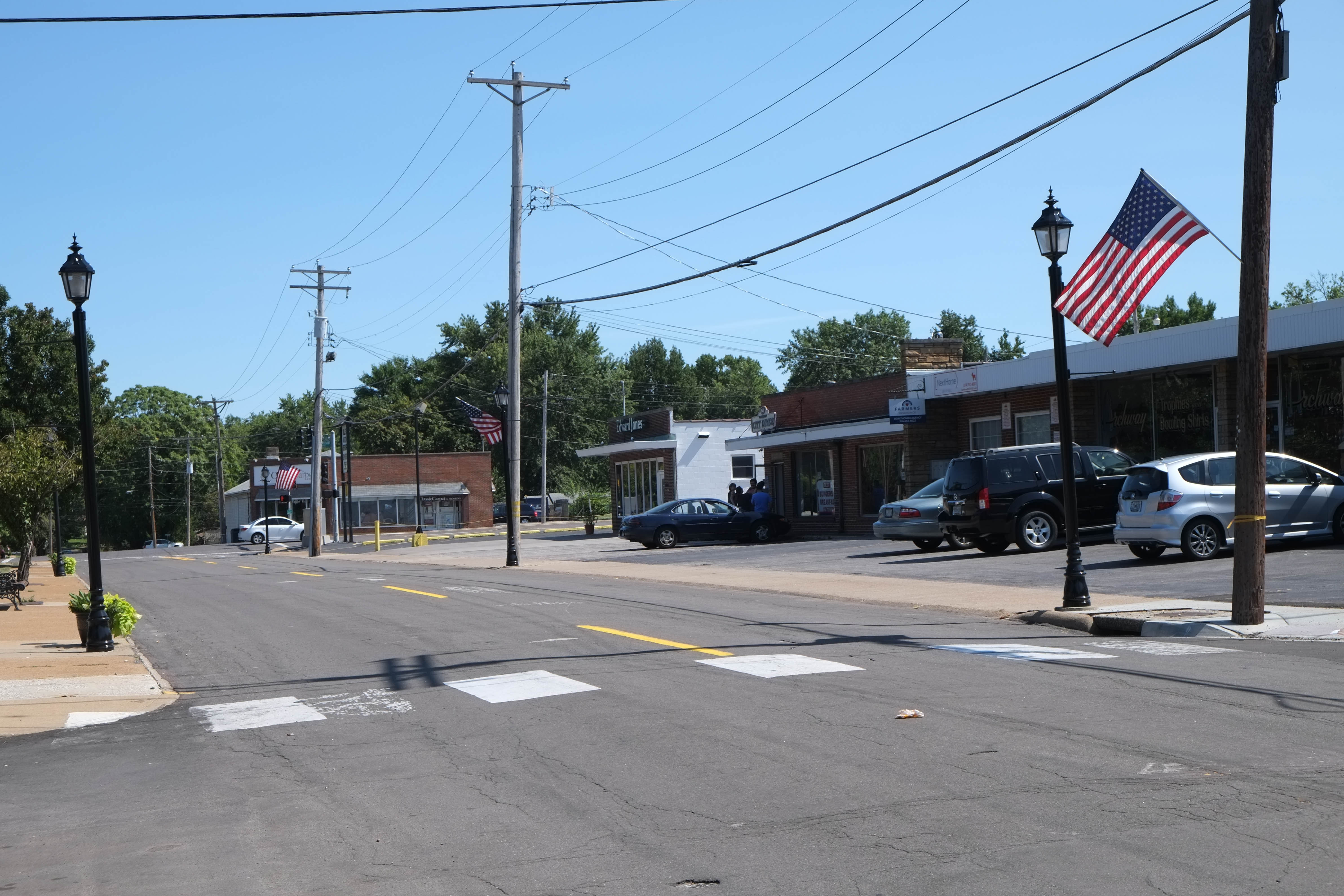 Florissant